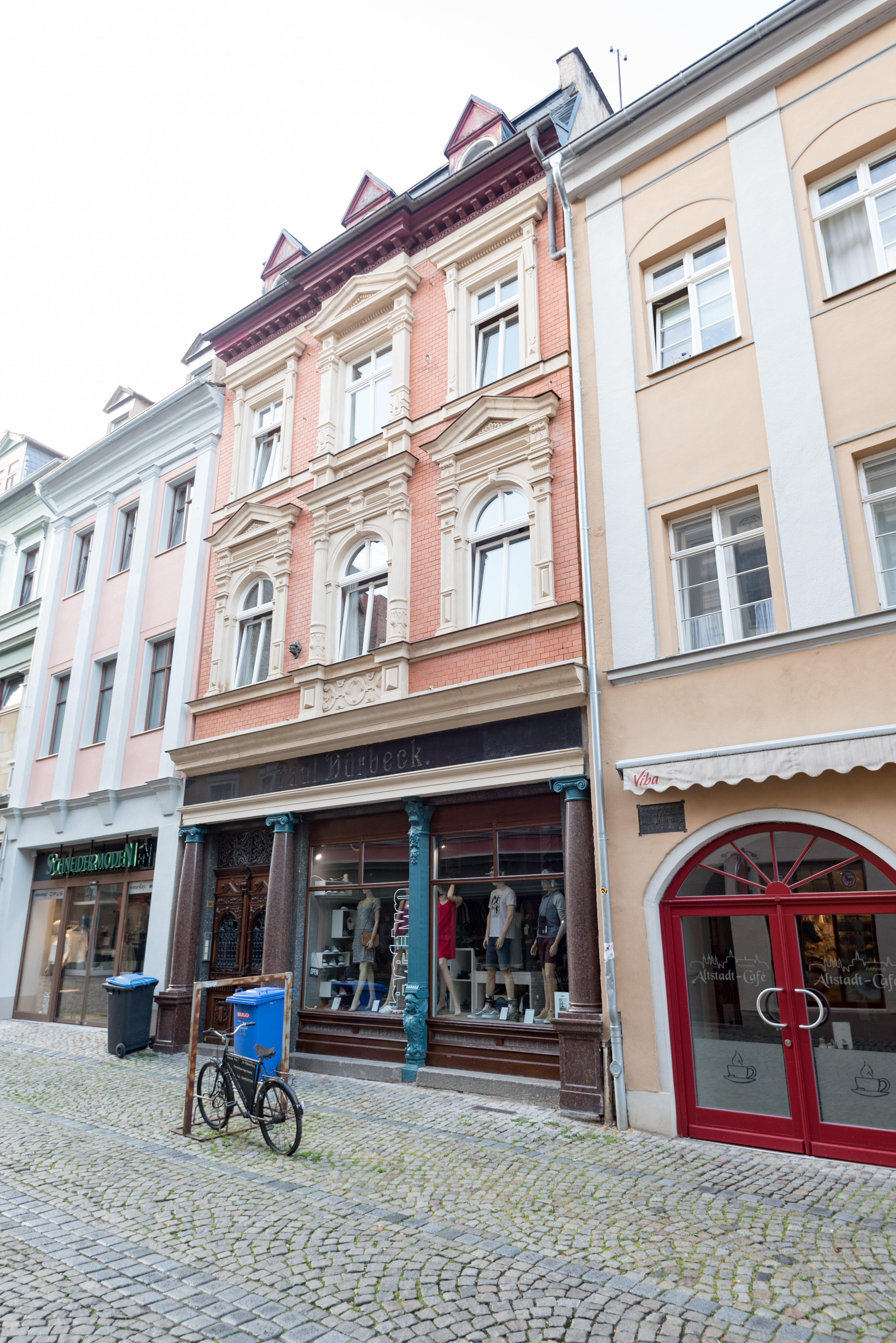 Naumburg (Saale), Herrenstraße 10